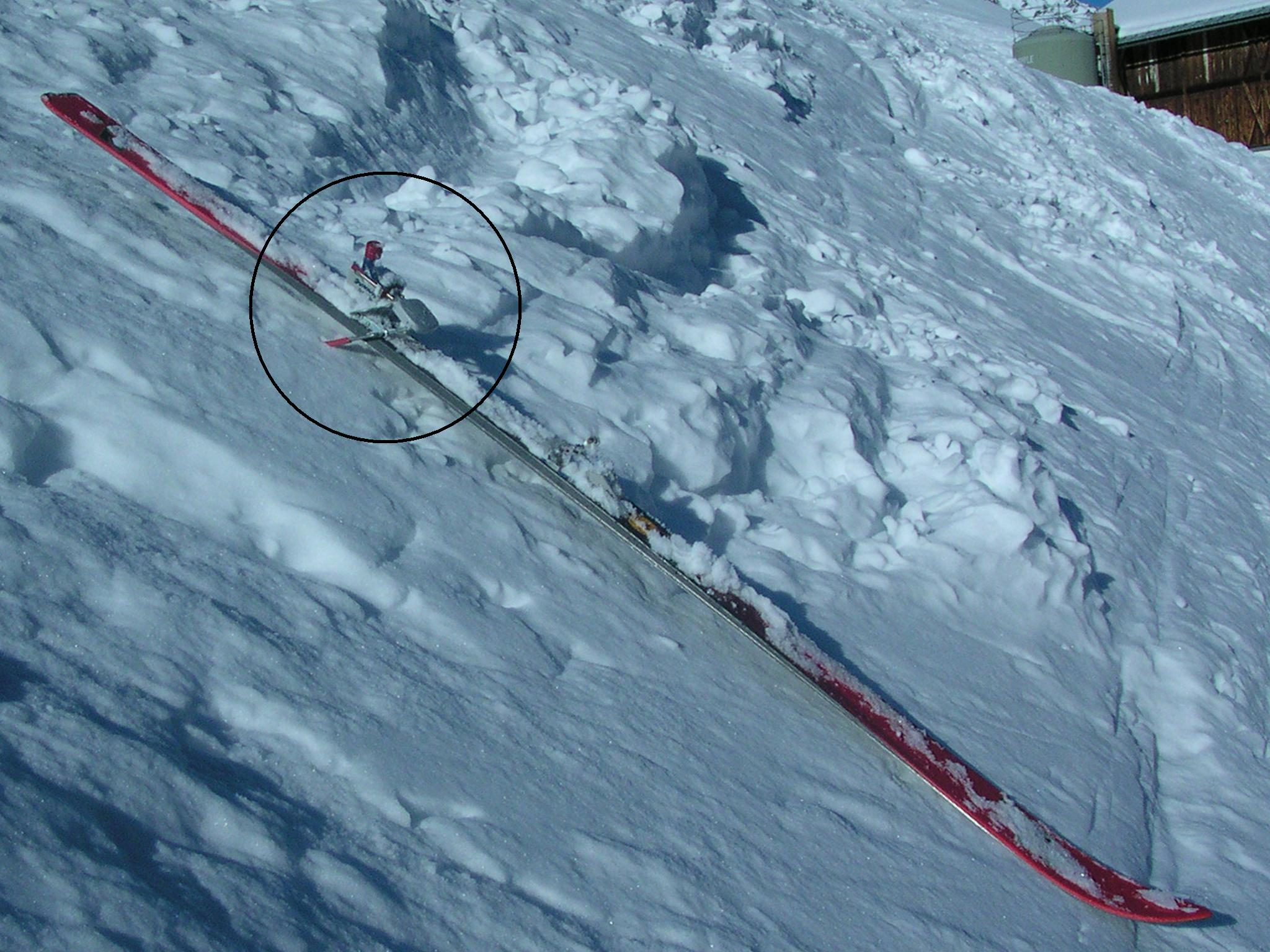 Skistopper